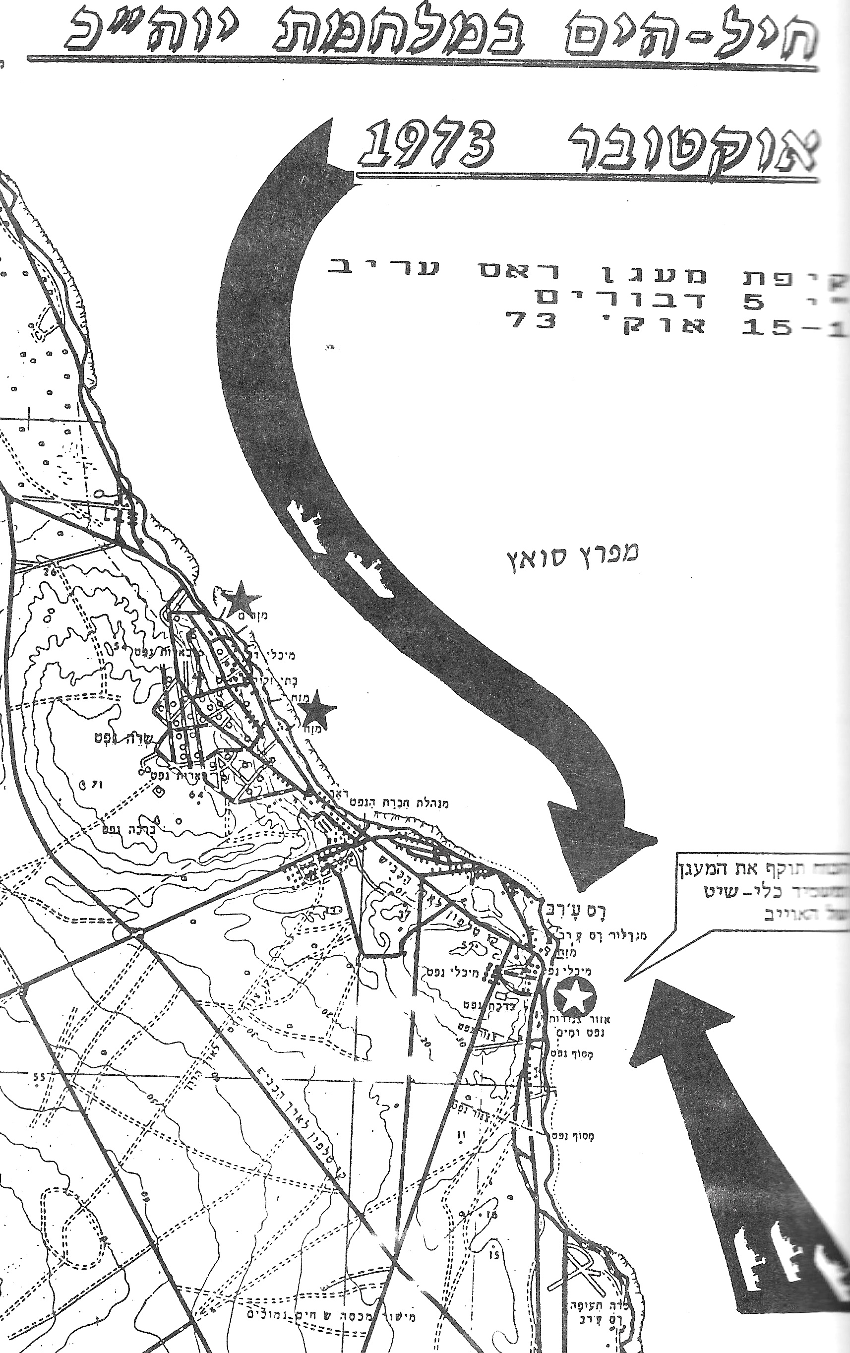 תקיפת מעגן ראס ע'ריב 14 באוקטובר 1973